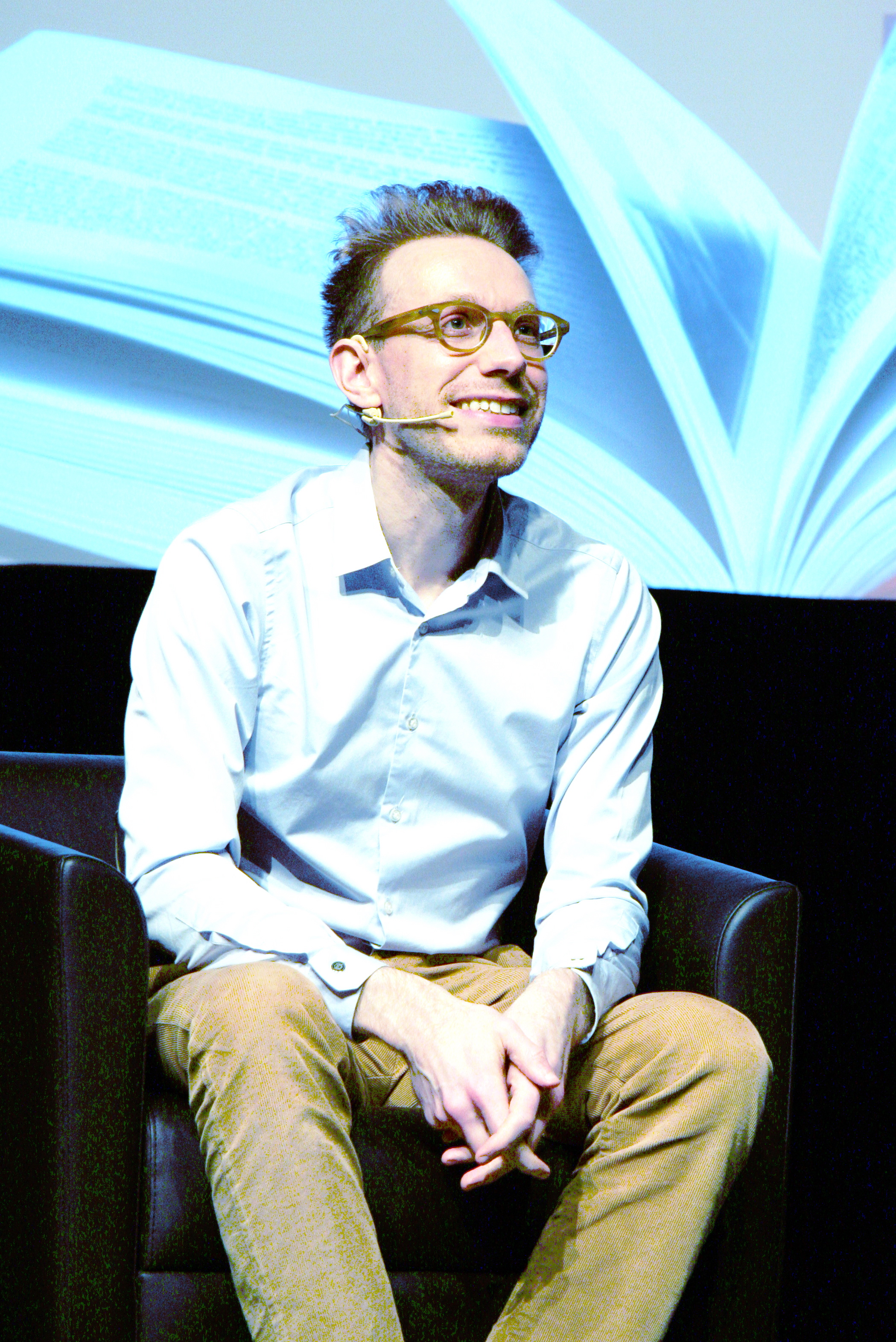 Daniel Tammet in Blue Met Festival (Montréal)